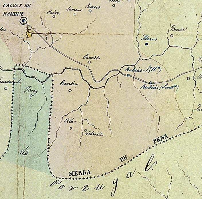 ver título